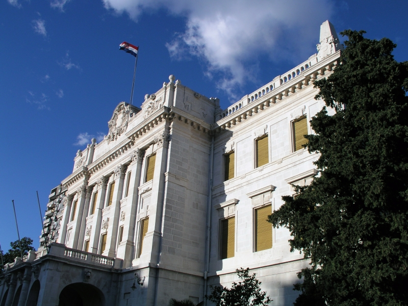 Pomorski i povijesni muzej Hrvatskog primorja u Rijeci, Hrvatska